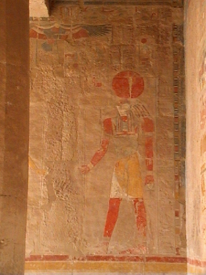 Relief peint représentant le dieu Rê - Temple d'Hatchepsout à Deir el-Bahari - XVIIIe dynastie égyptienne